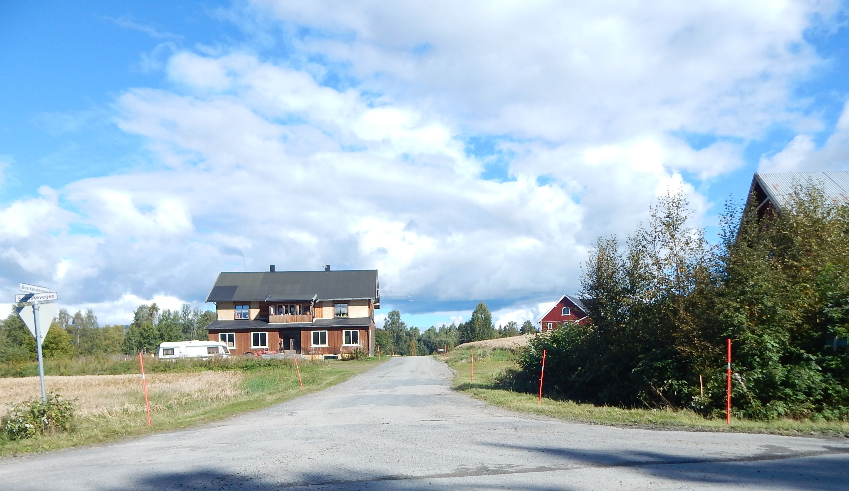 Øvre Ranumsvegen (fylkesvei 494) sett fra Svenskevegen (fylkesvei 455)